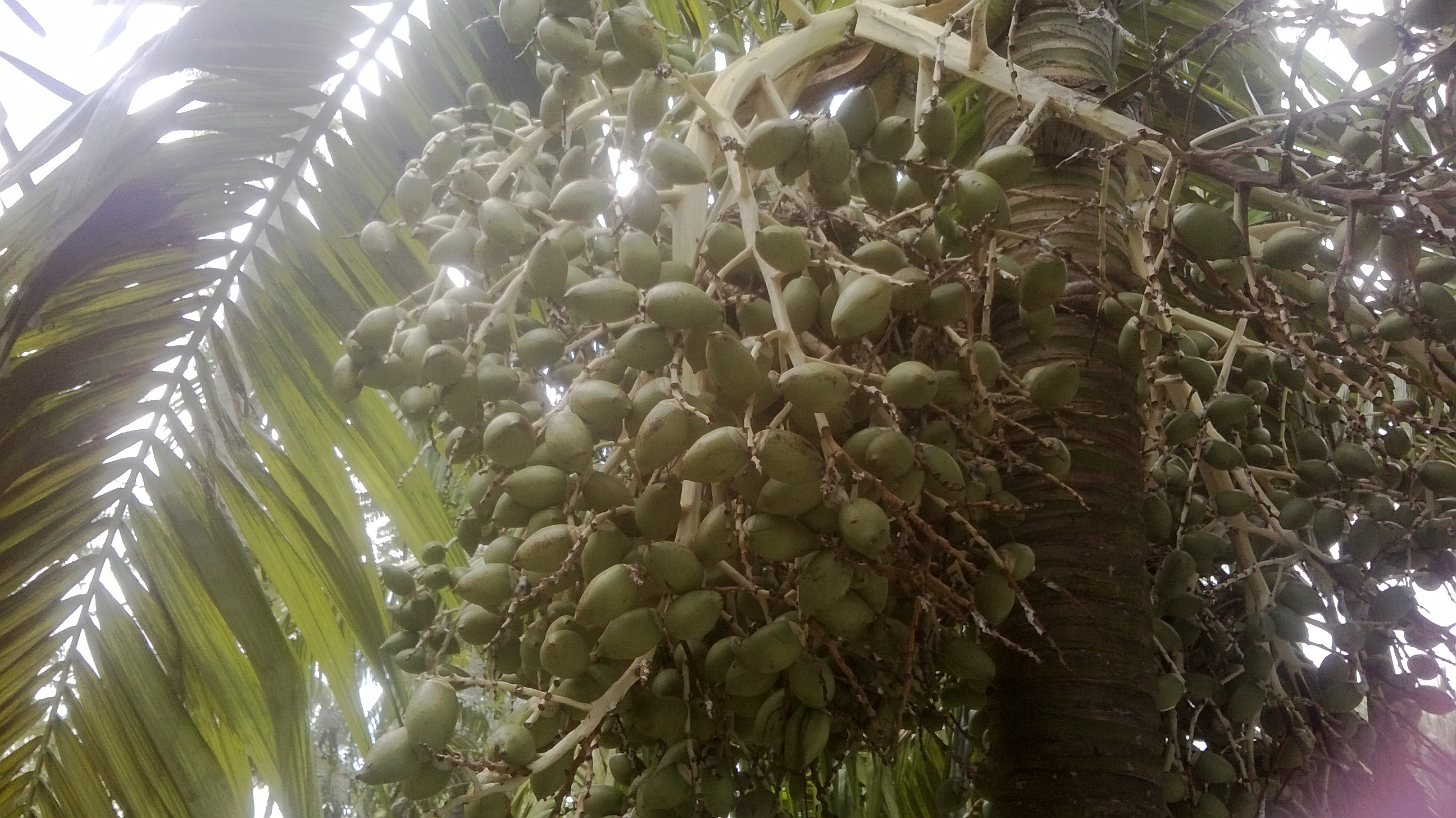 Ptychococcus Paradoxus. Nong Nooch Tropical Garden. Thailand.